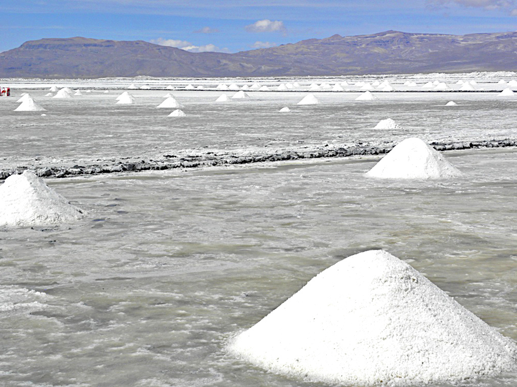 Pilares de sal en la Laguna de Salinas, en el departamento de Arequipa, Perú